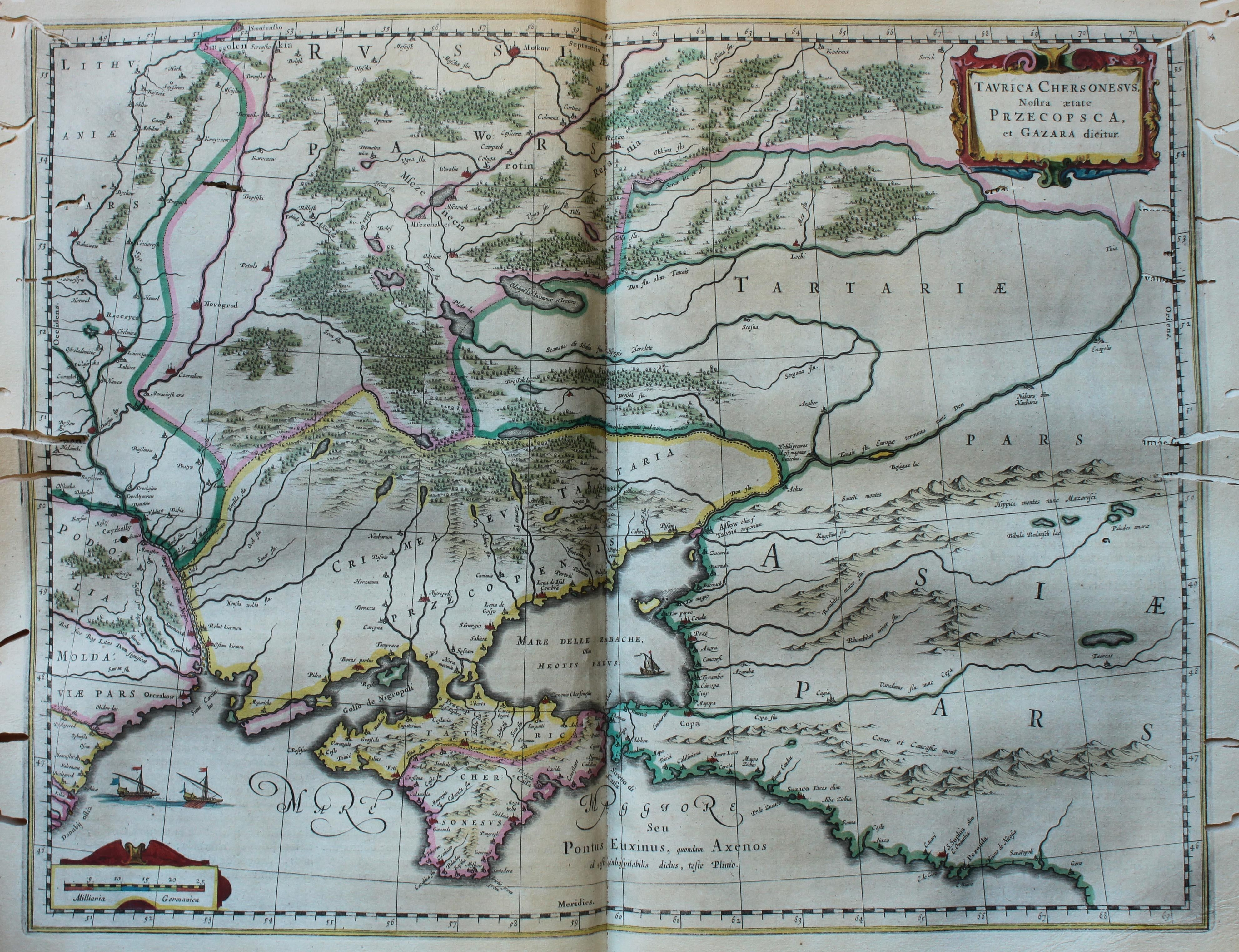 Descripción bibliográfica: Geographia Blaviana. - [Amsterdam : Juan Blaeu, 1659] . - [32], VI, 96 p., 34 f., h. 35a, 35b, 35c, 35d, 36-44 f., 34, [2], 36-40, [2], 43-70 [i. e. 75], [1] f., [20] p. de map., [9] f. de map., [4] f. pleg. de map., [2] f. de plan., [2] f. ge grab. : |bil. ; |cFol. marca major (57 cm.) . - En la dedicatoria a Felipe IV: "Presenta ... El Atlas Universal y Cosmographico de los orbes y terrestre ... Juan Blaeu" . - Título tomado del frontispicio. -- Privilegio fechado en 1659. -Errores de pag. - Sign.: 1, *2, **3, ***-****2, a-e2, A-I2, K1, L-Z2, Aa-Dd2, 4 2, Ee-Ff2, A-I2, K1, L2, M1, N-Y2, Z5, Aa-Dd2, Ee1, A-D2, E-F1, G-I2, K-L1, M-O2, P1, Q-Z2, Aa-Bb2, Cc1, Dd3, Ff-Zz2, Aaa-Bbb2, . - Frontispicio grab. col. -- Incluye un total de 49 il. entre map., plan. i grab. Materia: Atlas - Obras anteriores a 1800 Impresor: Blaeu, Joan, 1596-1673, imp. Lugar de impresión: Holanda. Amsterdam Localización: Vea la ilustración en su contexto Visite también la exposición "Cartografía histórica en la Biblioteca de la Universidad de Sevilla"